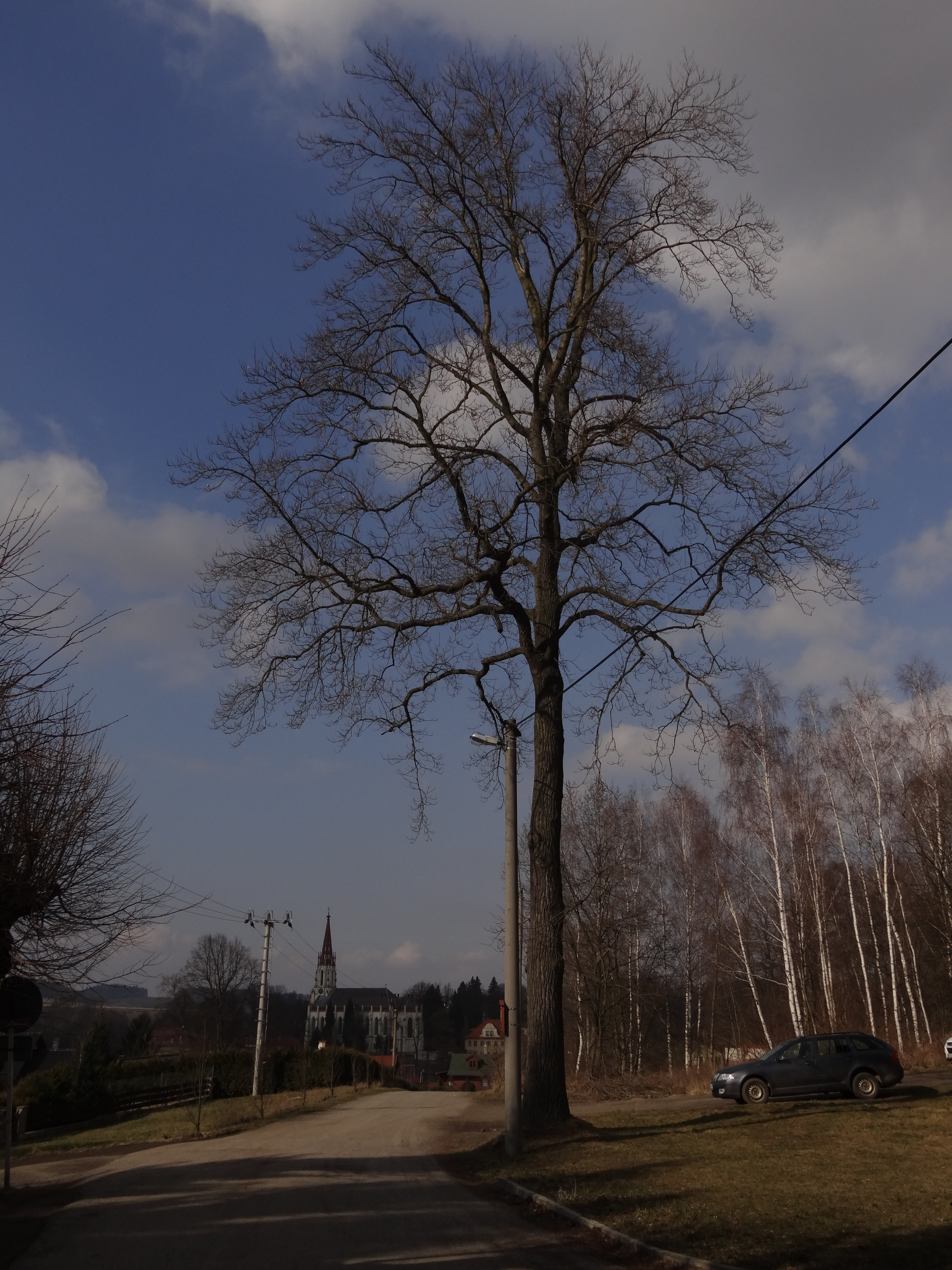 Památný liliovník tulipánokvětý v Chrastavě u hřbitova (Hřbitovní ul.)